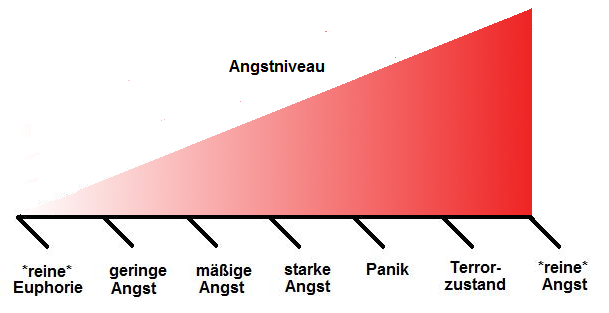 Polarer Aufbau und variierende Grade der Angst nach Peplau